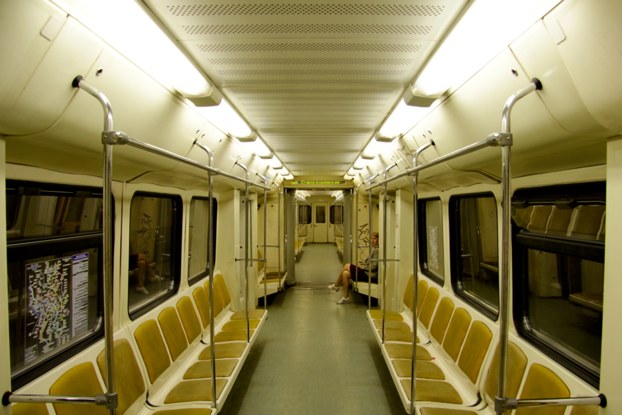 Moscow Metro (Московский метрополитен) Butovskaya Line of Light Metro (Бутовская линия лёгкого метро)